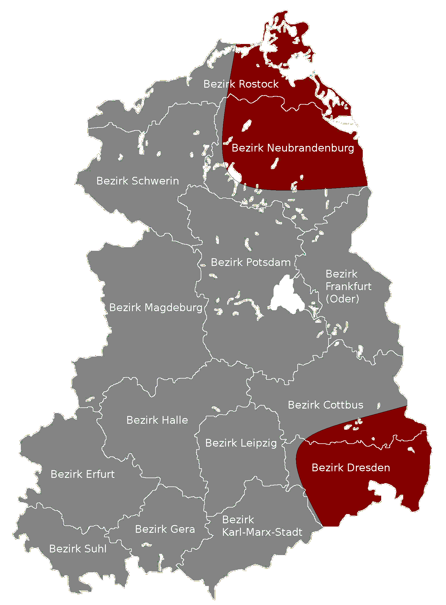 Ungefähre Gebiete in der DDR ohne West-Fernsehen